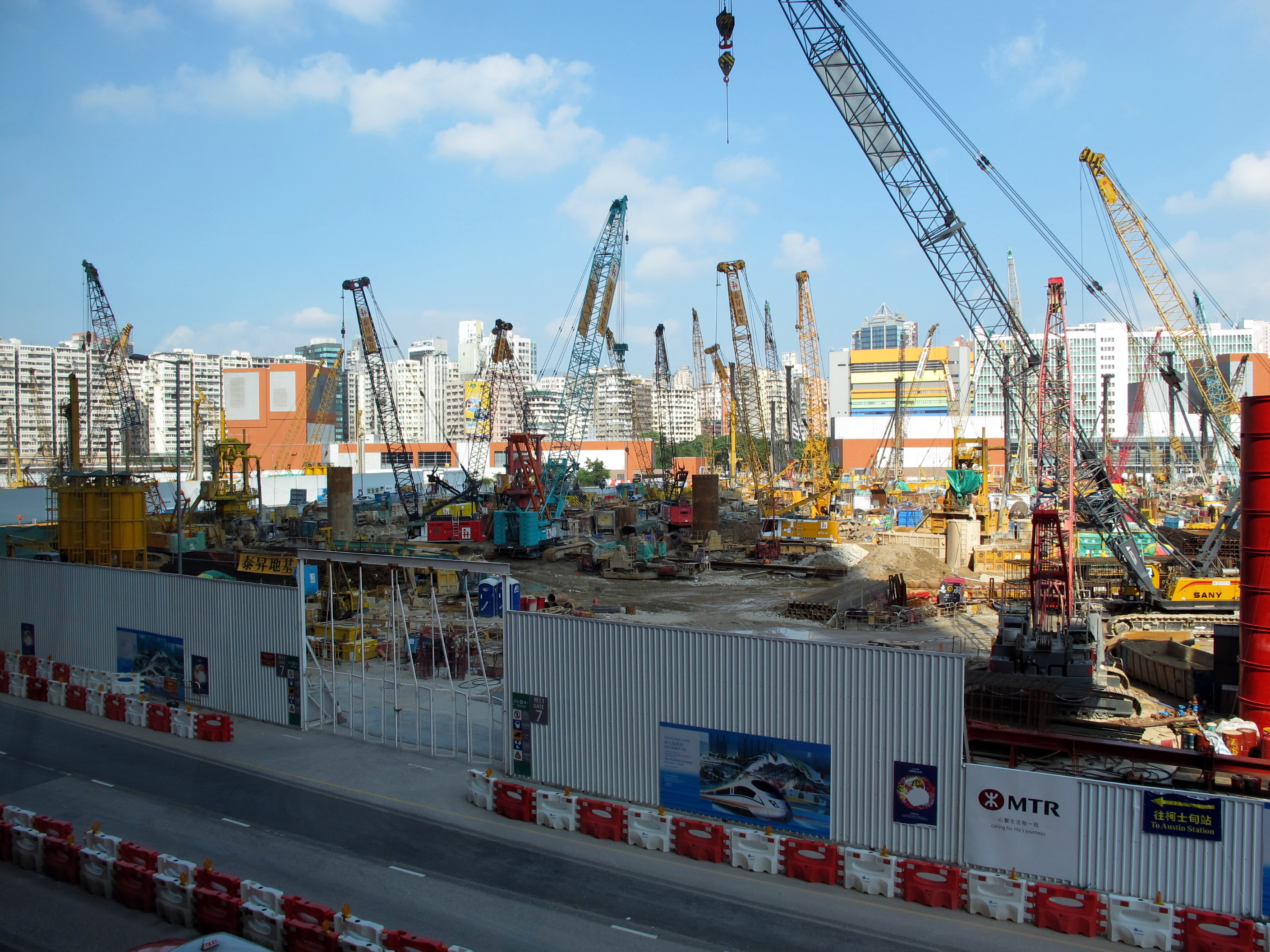 West Kowloon Terminus Site View